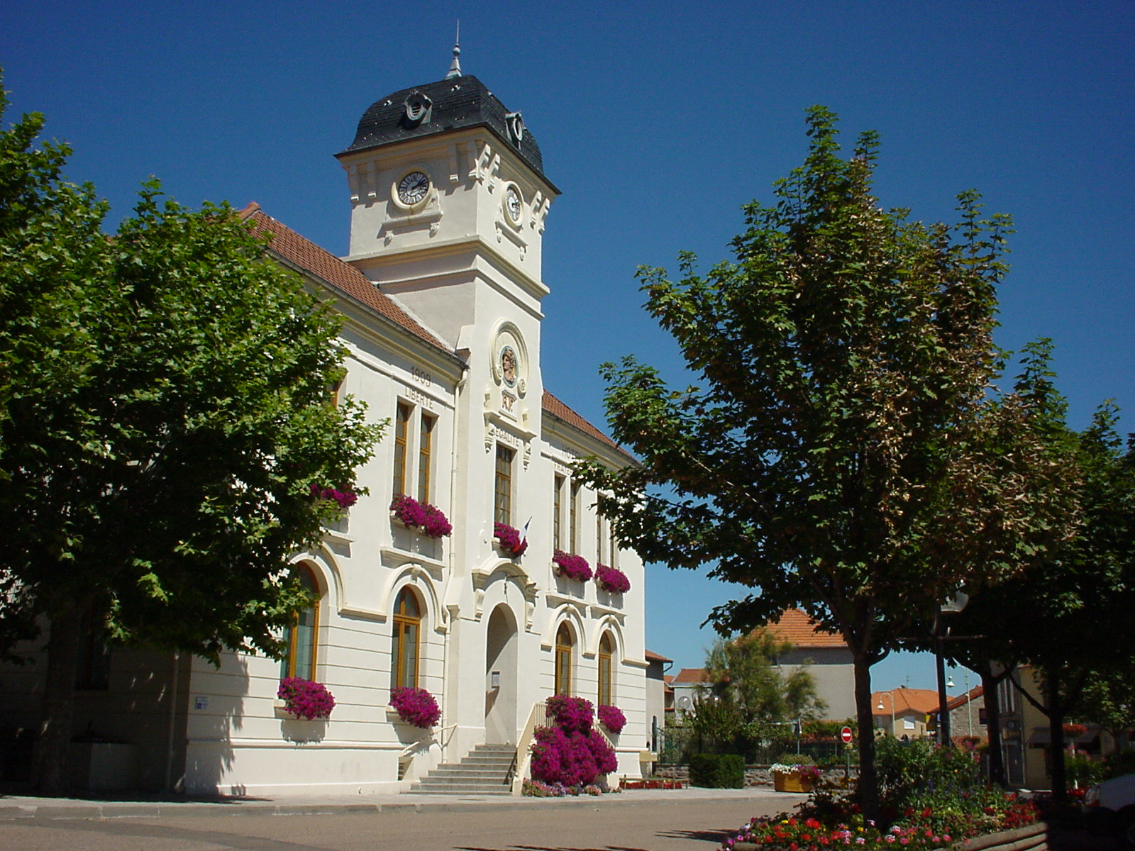 Mairie de Renaison